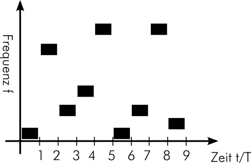 Frequenzsprungverfahren